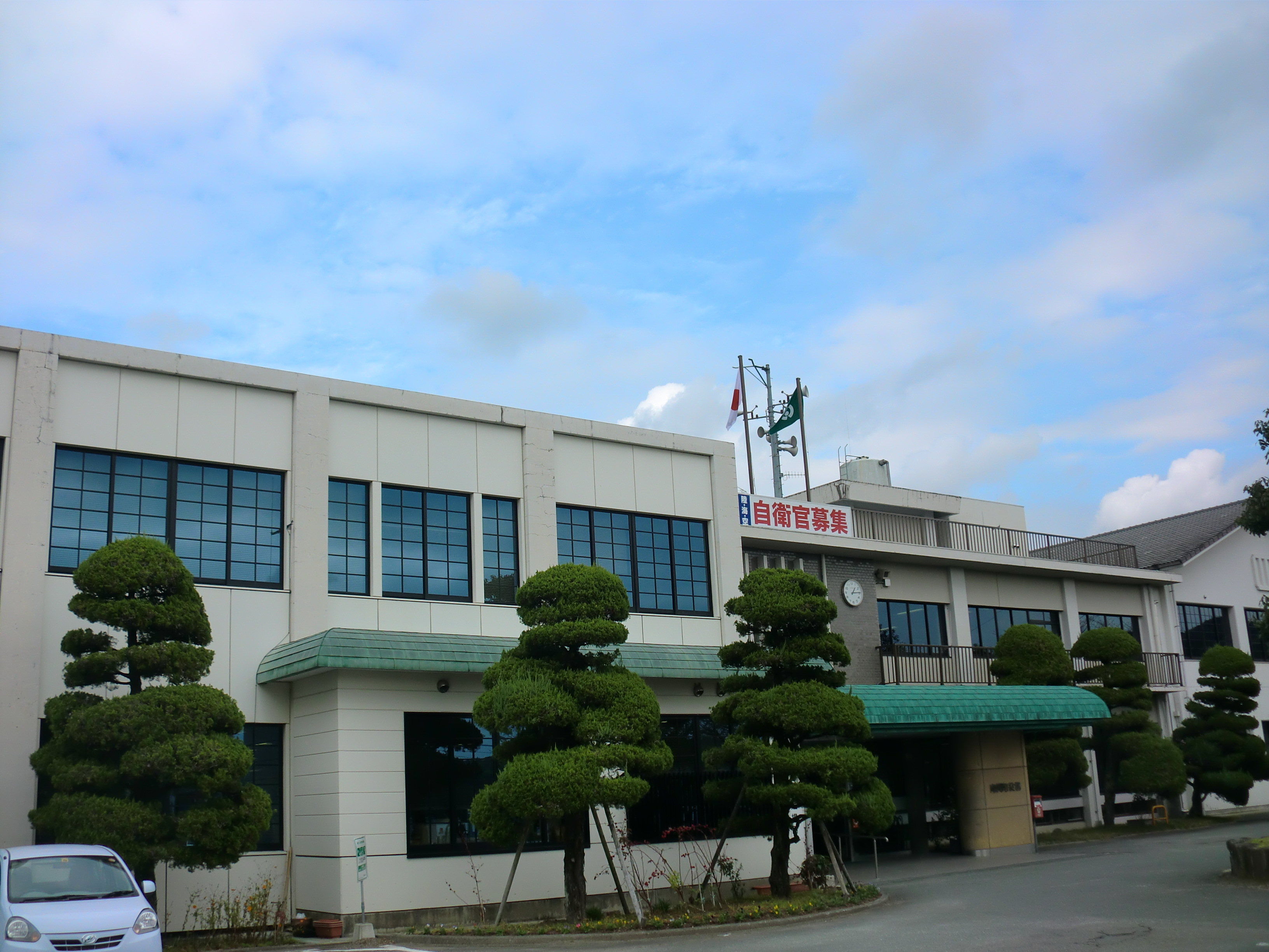 熊本県玉名郡南関町にある南関町役場